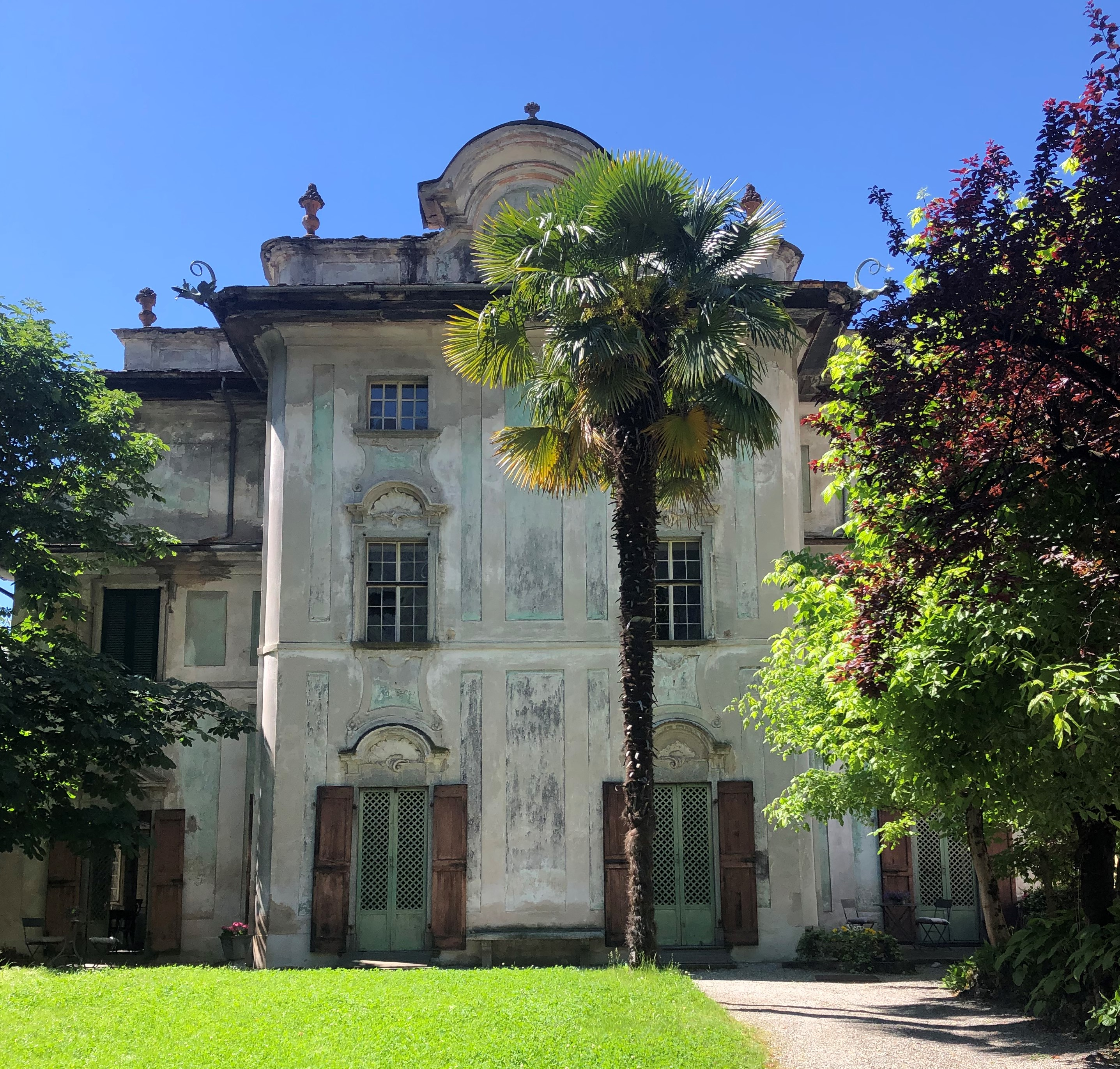 Facciata principale di Palazzo Salis, residenza storica a Chiavenna.